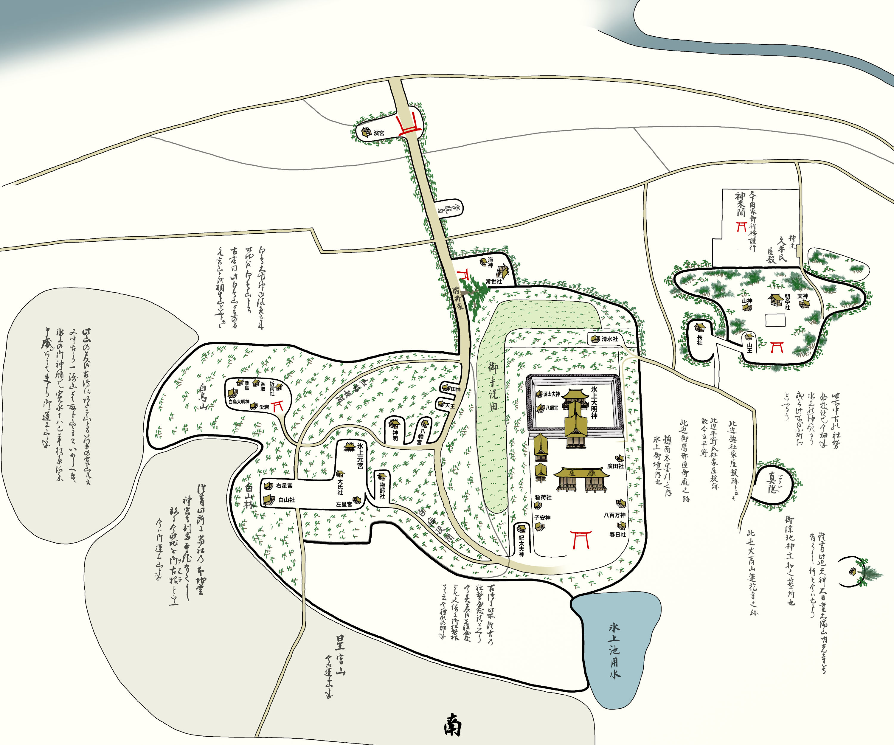 氷上山の図（岩瀬文庫所蔵『氷上山之圖及自熱田至氷上道路名勝粗記之』を元に作成。）